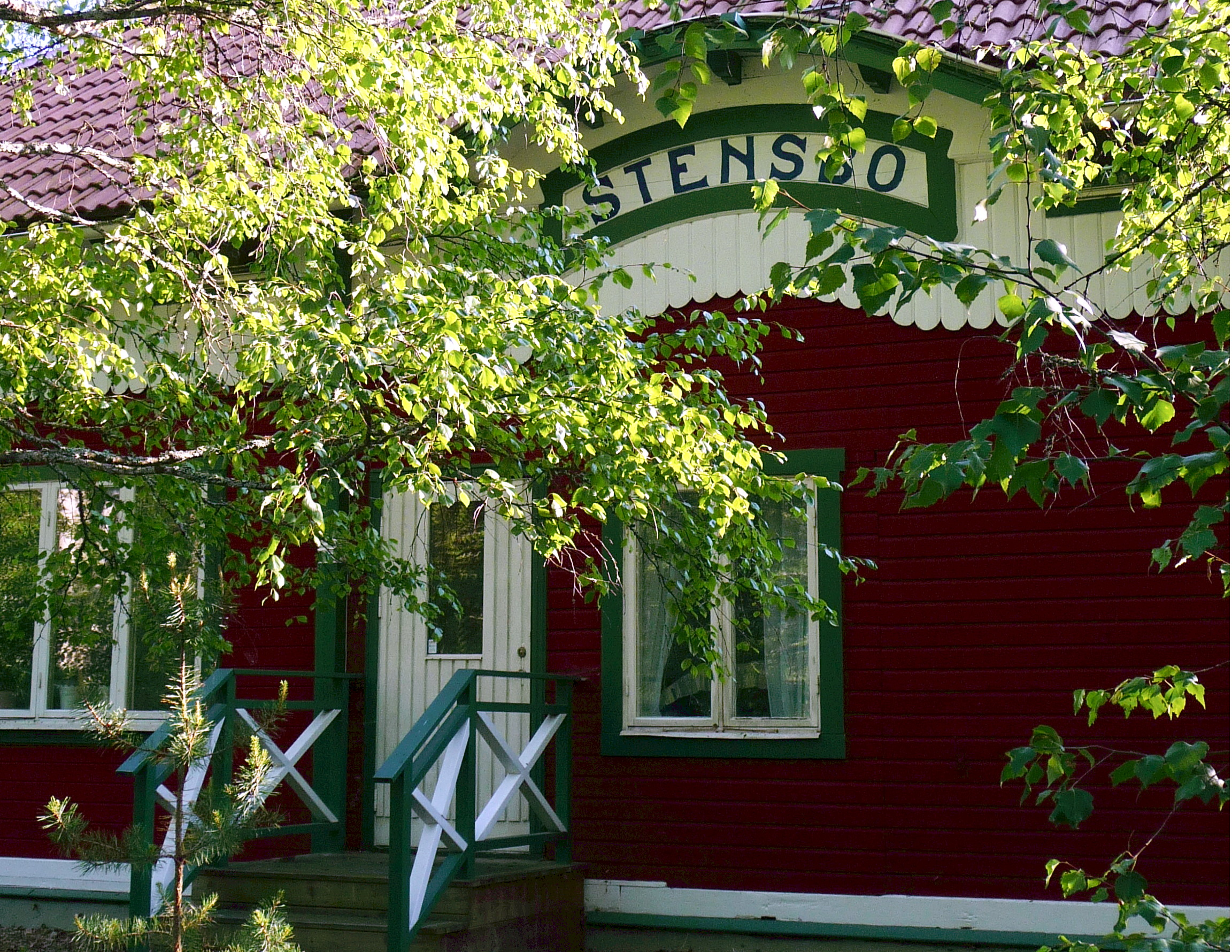 Stockholm-Västerås-Bergslagens Järnvägar, stationshus Stensbo